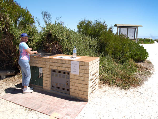 Barbecue. Australijski glill